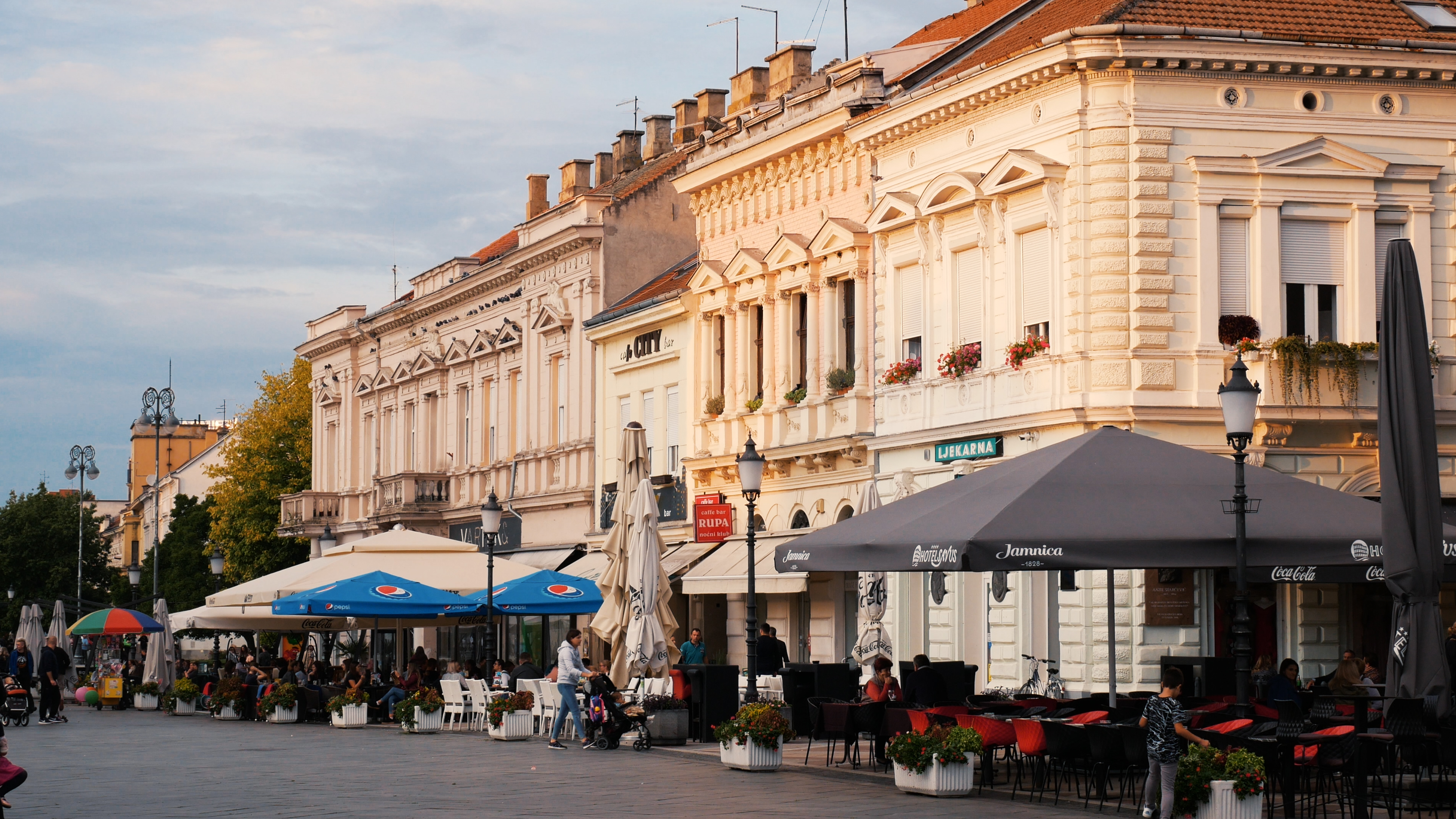 Palače na Trgu Ivane Brlić Mažuranić u Slavonskom Brodu